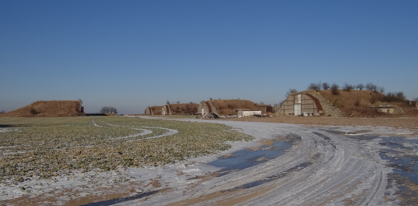 Hangary poradzieckie w Kluczewie, w tym tzw. „łubina” czyli jeden ze schrono - hangarów typu AU-11 dla samolotów MiG-21 i schrono - hangar typu AU-16/2 w Kluczewie dla samolotu Su-27, 2016 r.